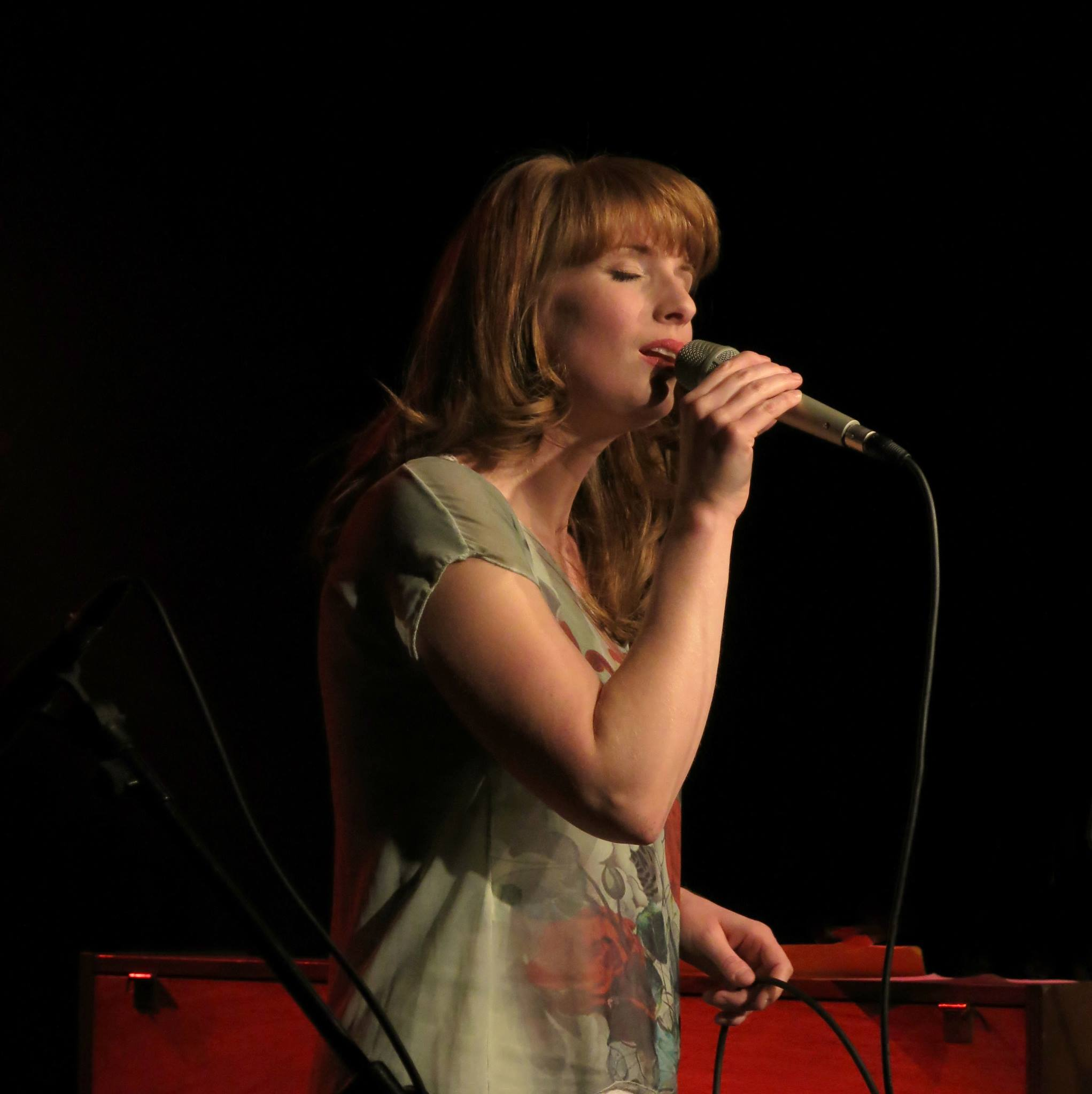 Beim Konzert am 23.1.2015 im Haus der Stadt in Düren